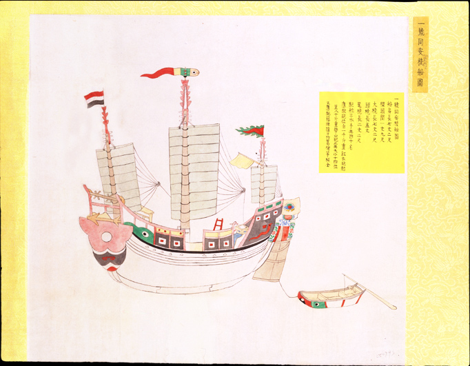 中文（台灣）: 清朝軍機處奏折副本的一號同安梭船圖